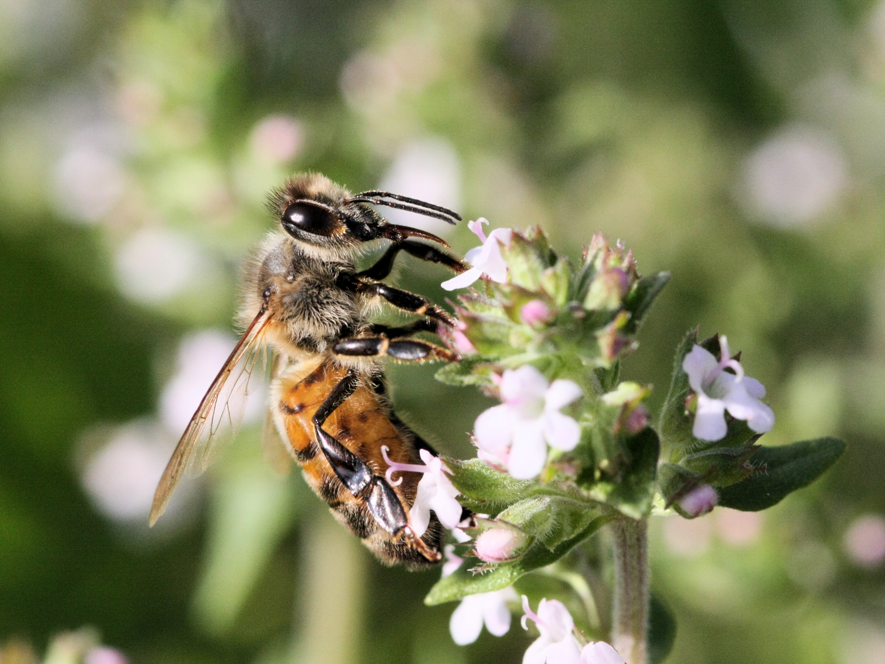 Apis mellifera abeille butineuse sur une fleur.